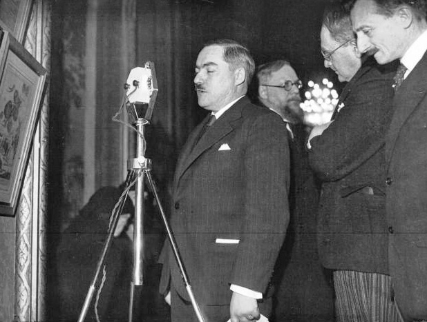 M. Déat, ministre de l'Air : photographie de presse